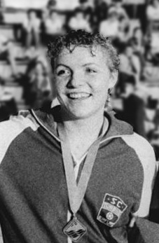 Cornelia Sirch